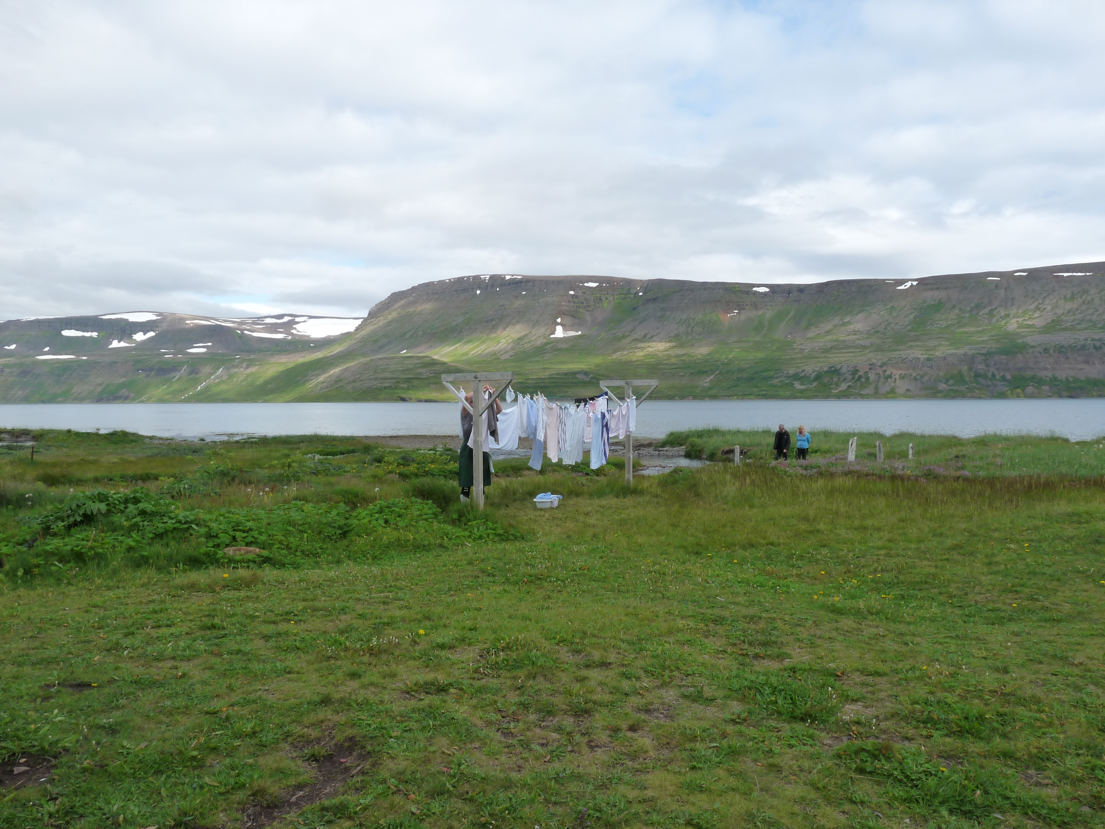 Hesteyri bij het Hesteyrarfjörður